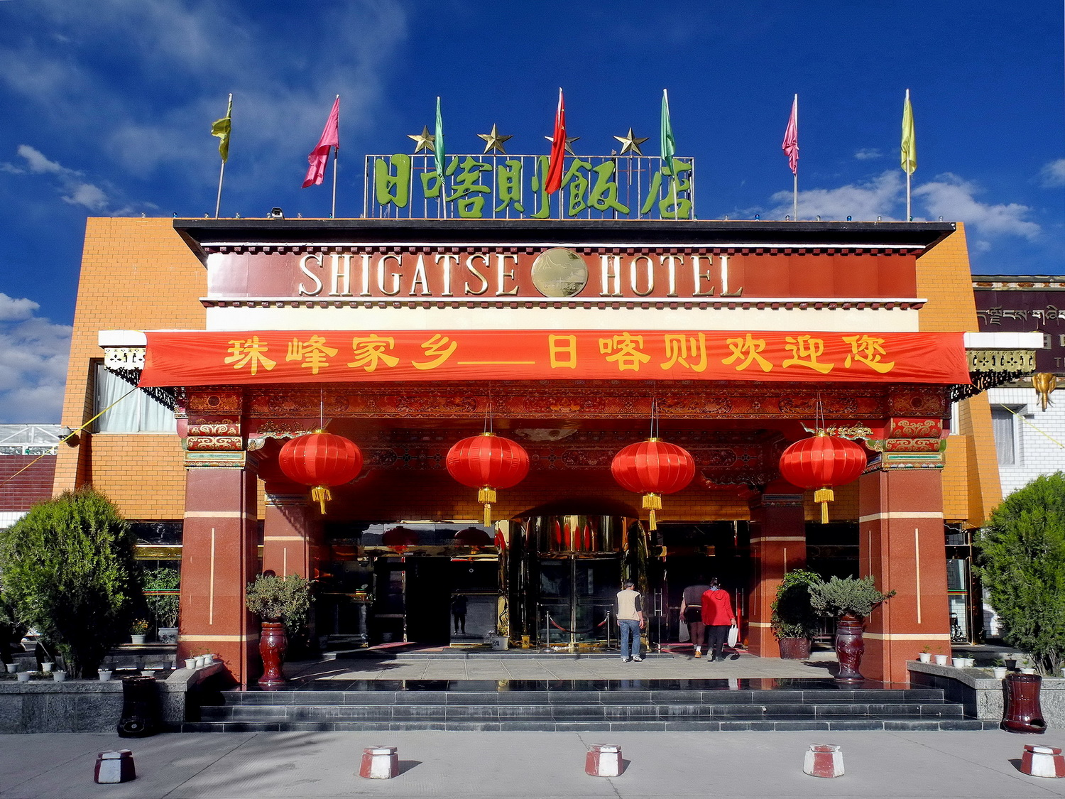 Tibet : Shigatsé hotel ****